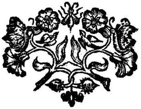 Afbeelding uit Nieuwe tydinghen uyt verscheyden quartieren van Europa, ghekomen tot Brussel tzedert den 18. tot den 23. Julii 1635